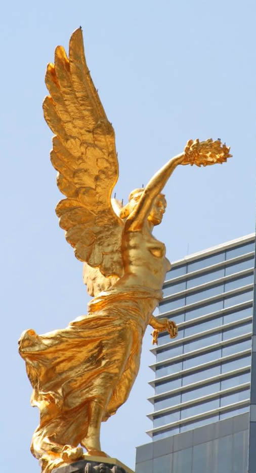 Detalle de la escultura del Ángel de la Independencia